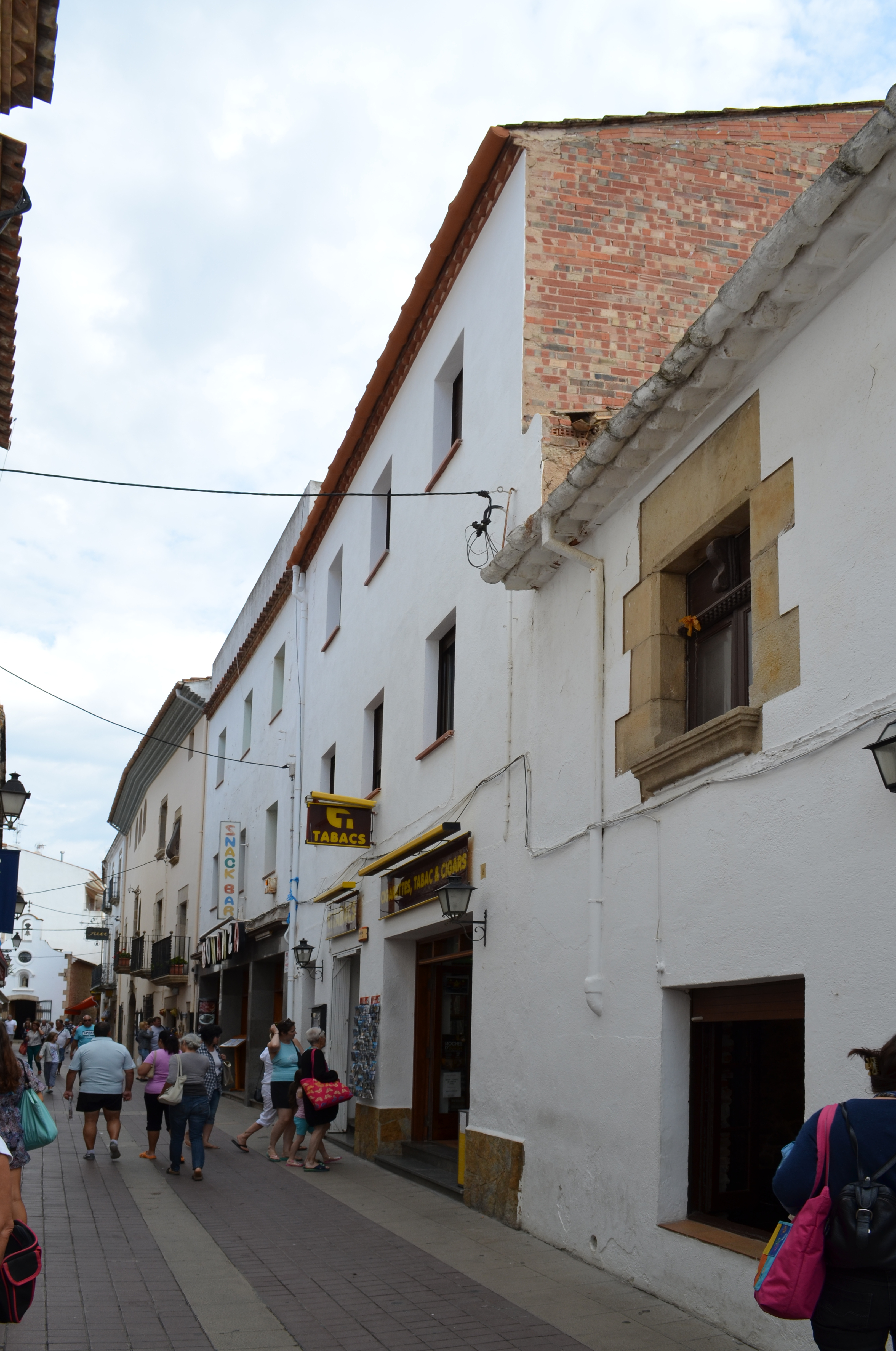 Tossa de Mar, Habitatge al carrer Mare de Déu dels Socors, 8